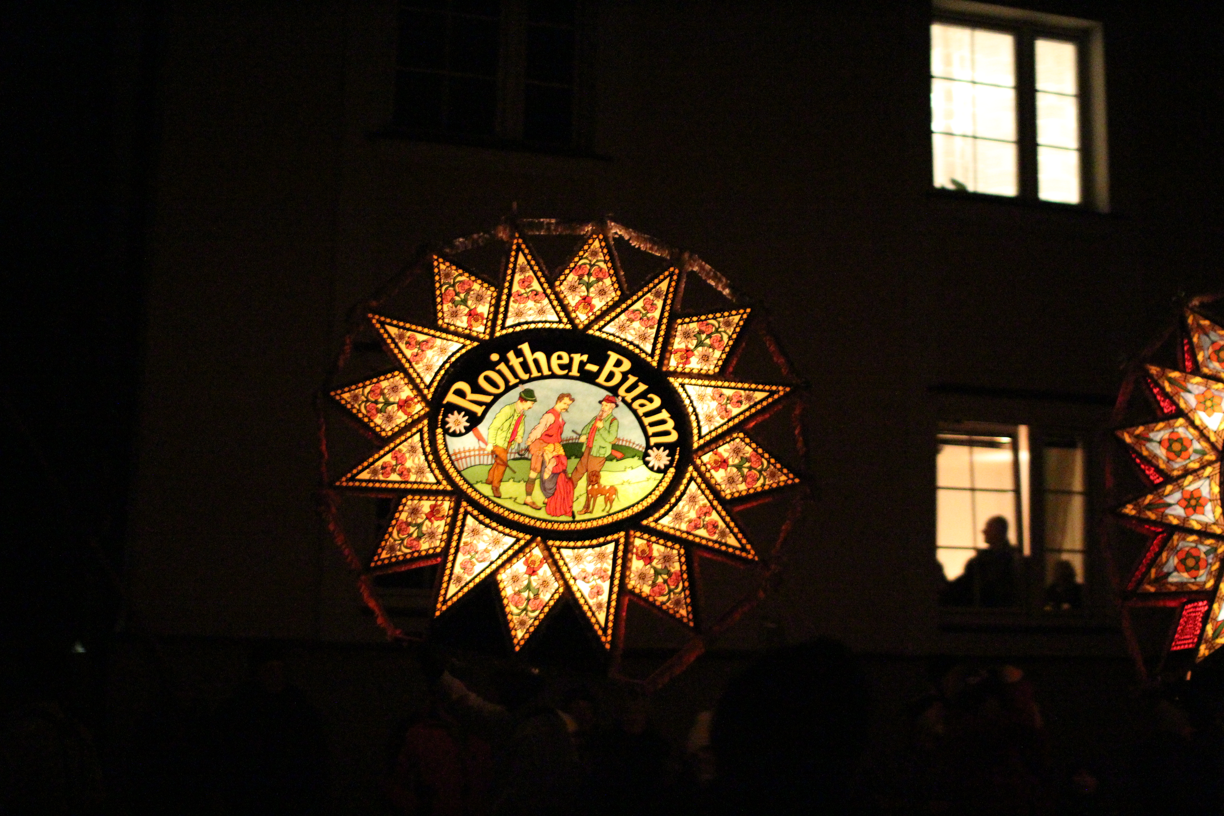 Ebenseer Glöckler